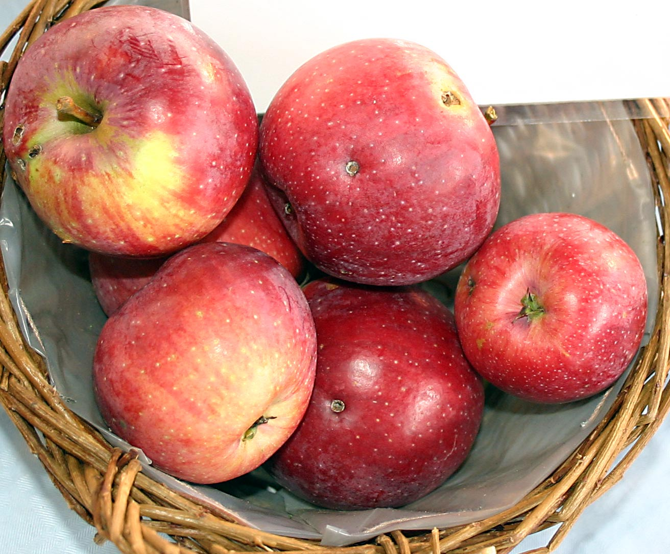 Der Berner Rosenapfel oder Berner Rose ist eine Sorte des Kulturapfels (Malus domestica).